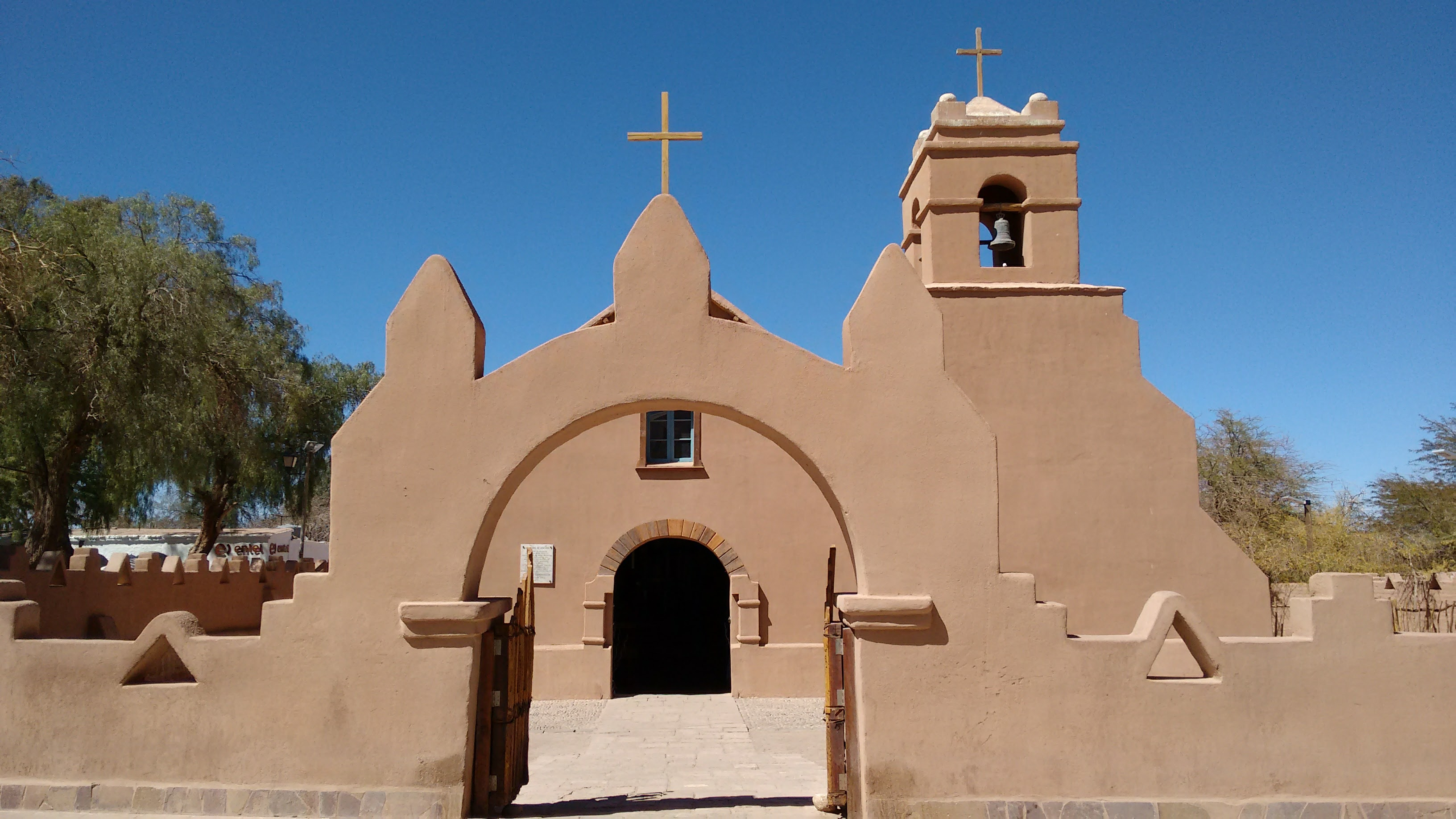 Fachada de la iglesia de San Pedro tras su restauración en 2015. San Pedro de Atacama, Chile.